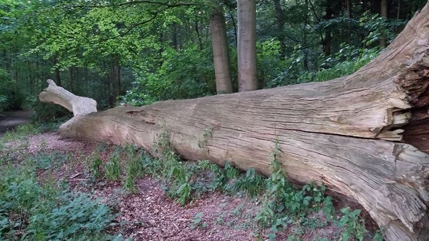 De Tre Edsege ligger i Augustenborg Skov